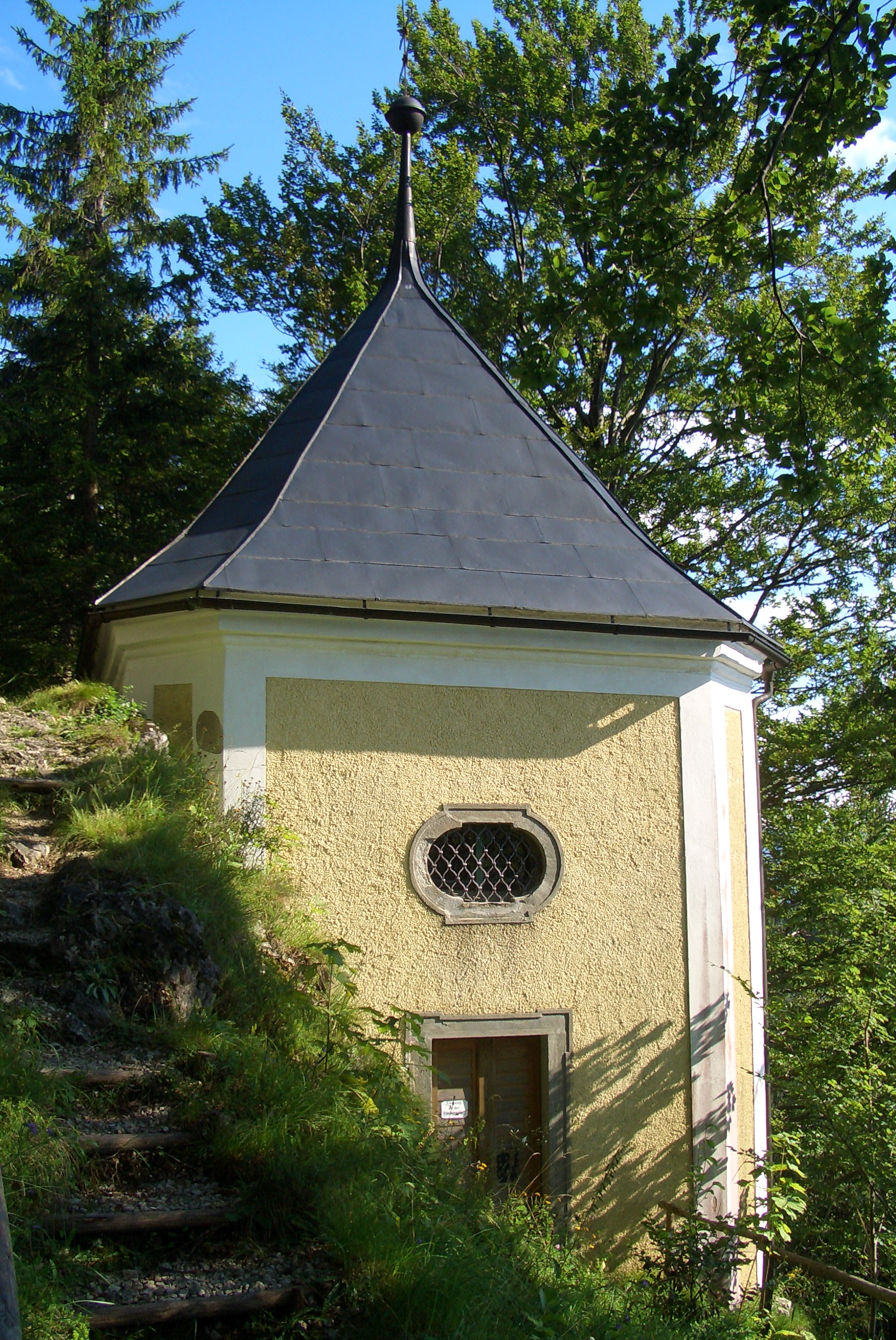 Kath. Filialkirche hl. Sebald Heiligenstein